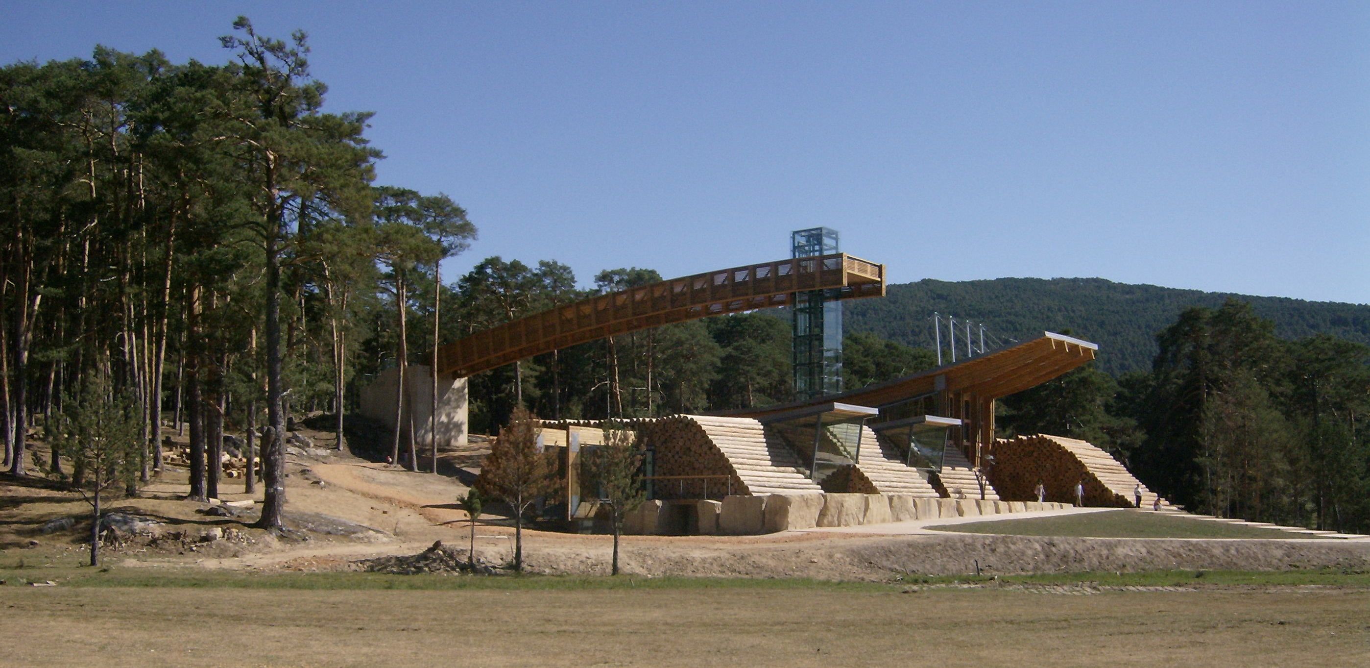 Casa de la Madera. Museo etnografico situado en Revenga, en Burgos (España)